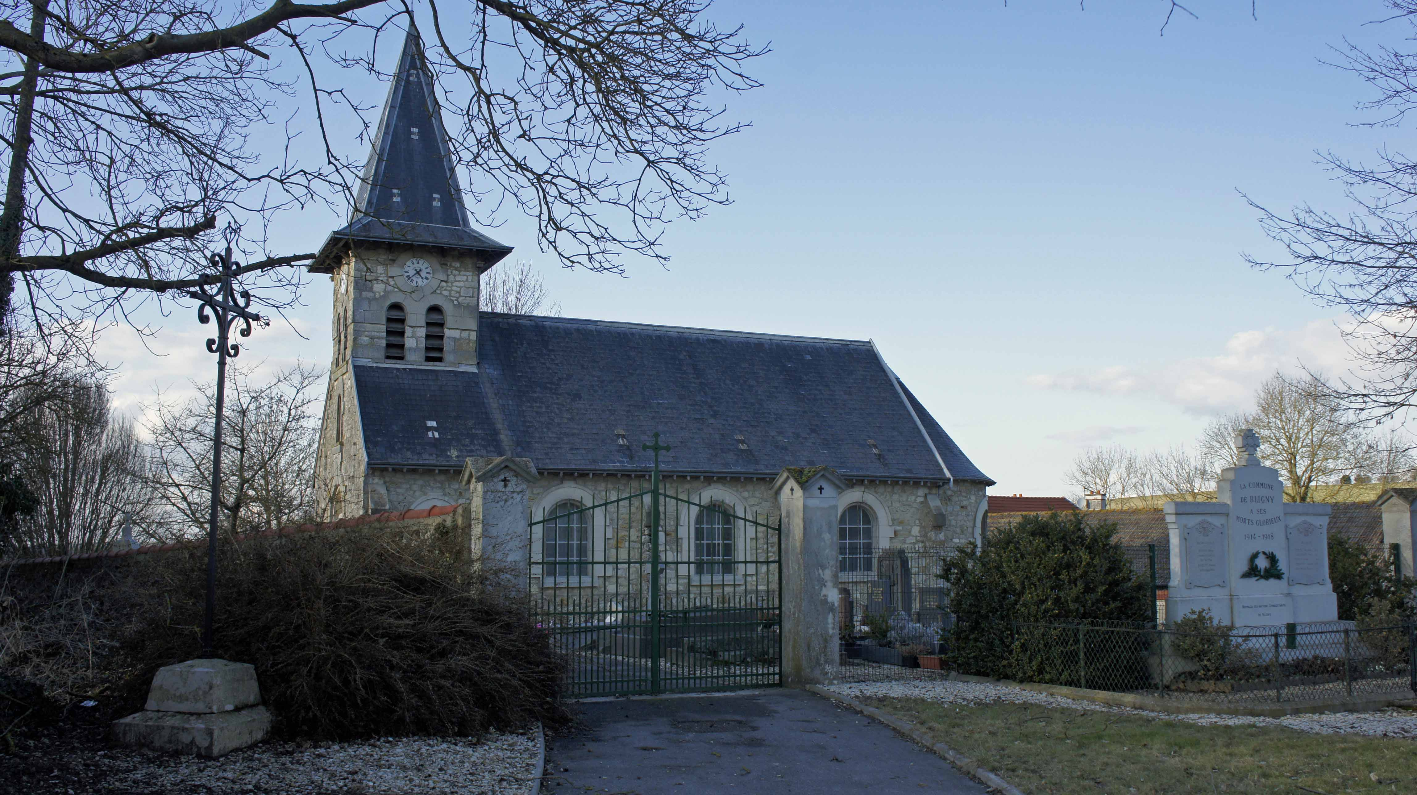 Croix, église, monument aux morts de la commune de Bligny.